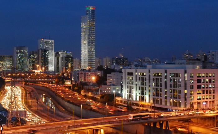 Ramat Gan